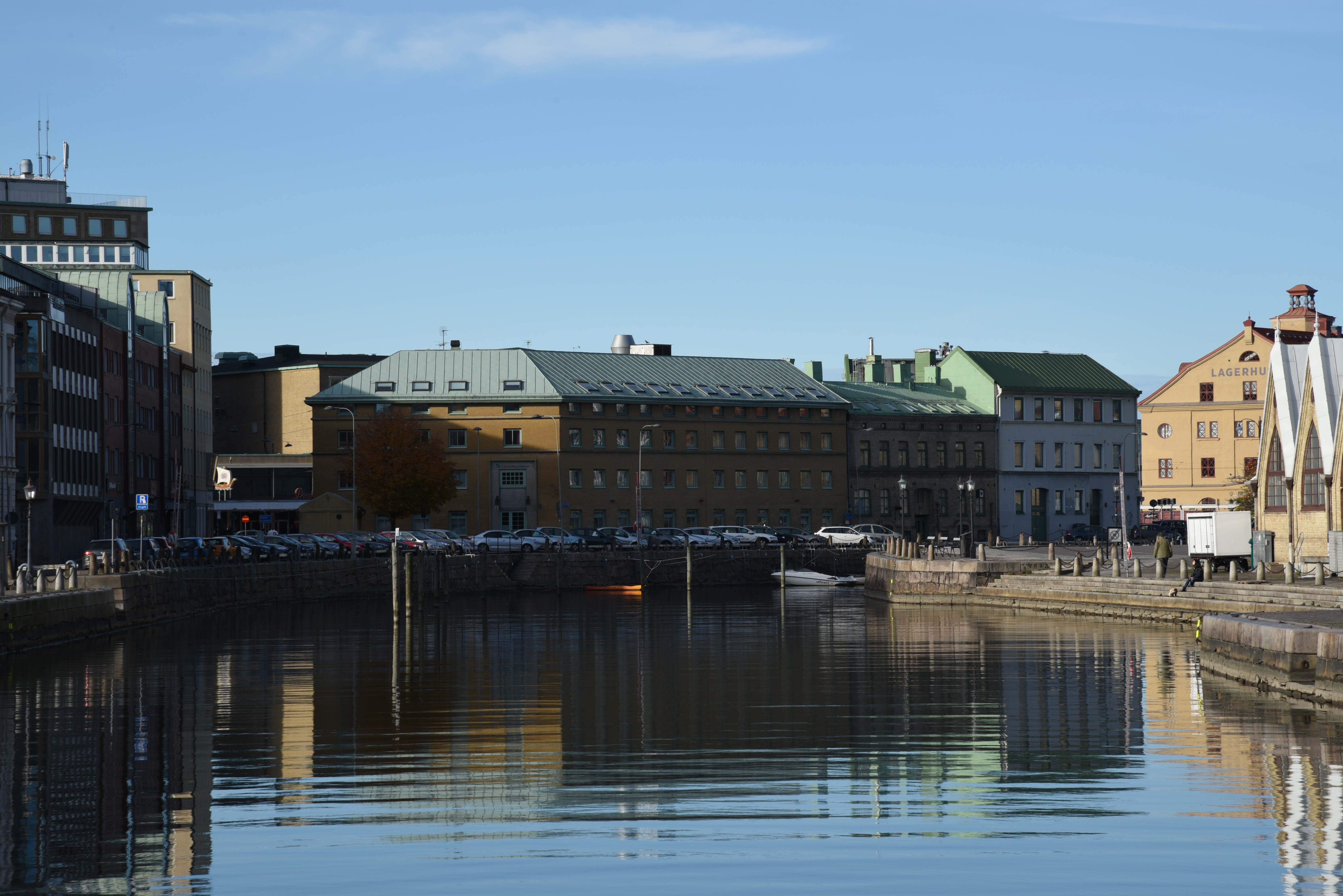 3 kvarteret Röda Bryggan i stadsdelen Pustervik i Göteborg sett från Rosenlundskanalen.